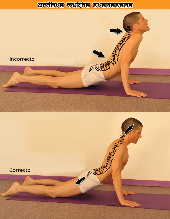 Prof. Kake Peixoto